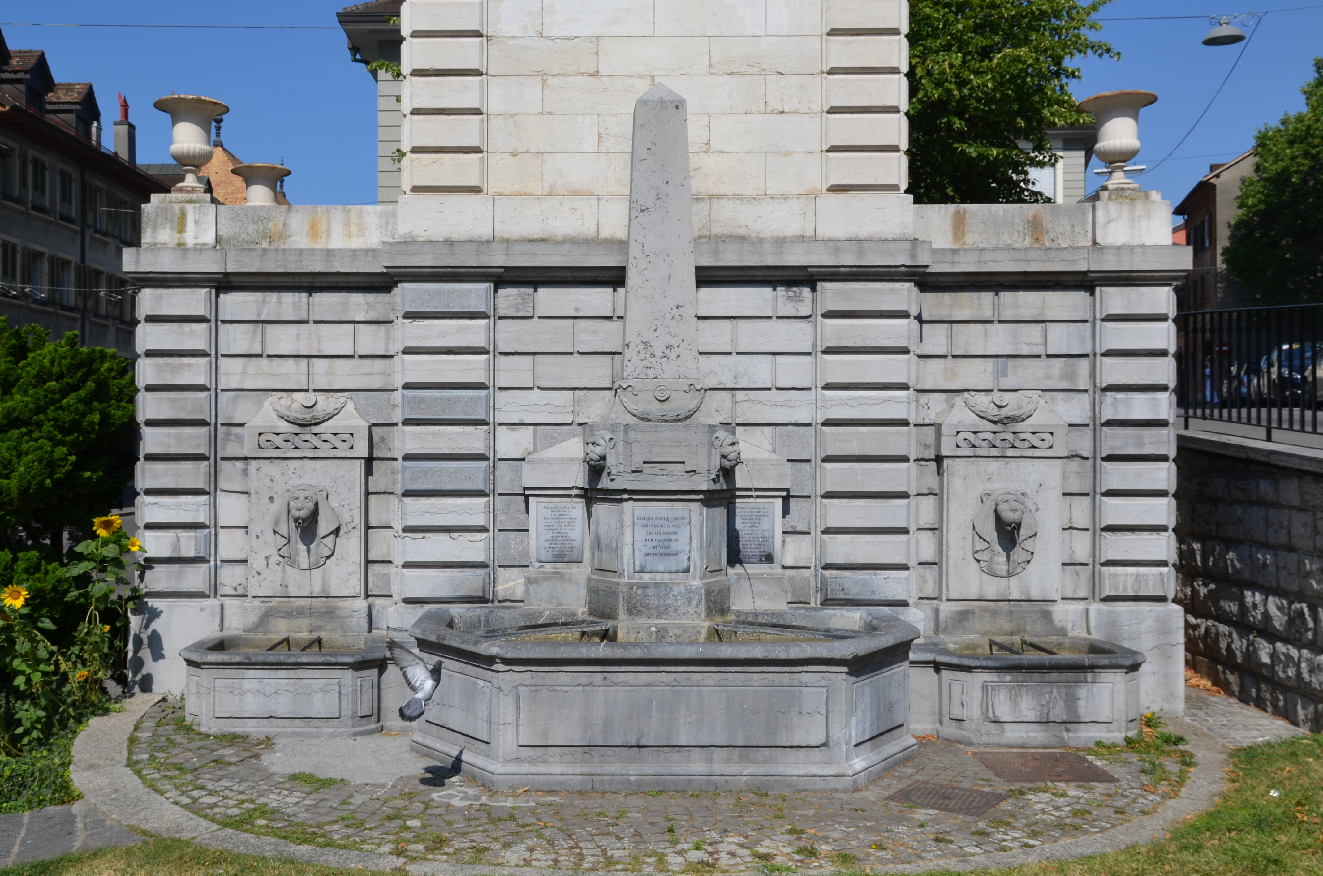 Vevey (Vaud-Suisse) - Fontaine orientale.